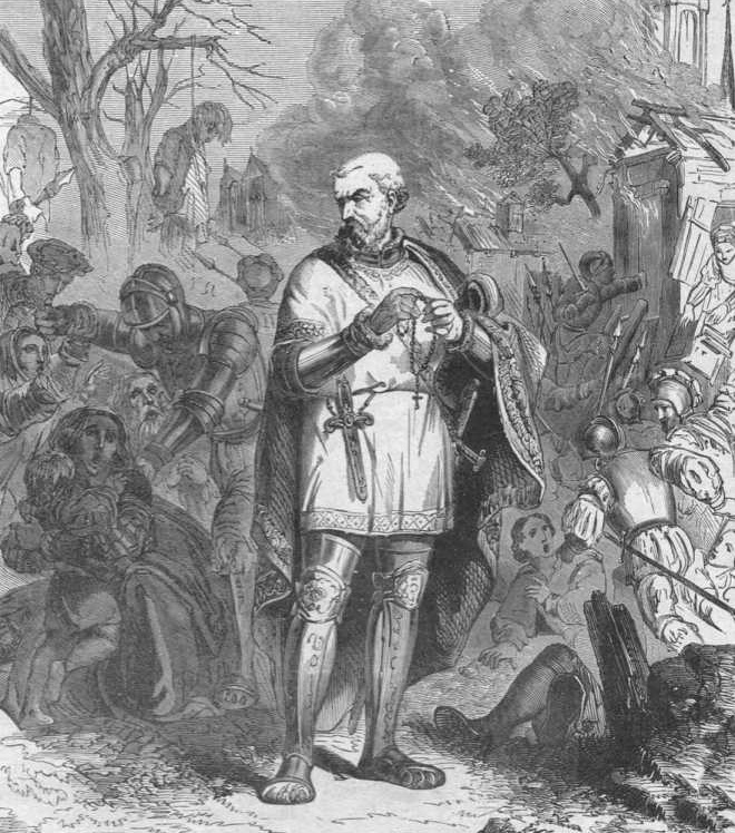 Répression de la jacquerie des Pitauds par le connétable de Montmorency en 1549. Lithographie du XIXe siècle.